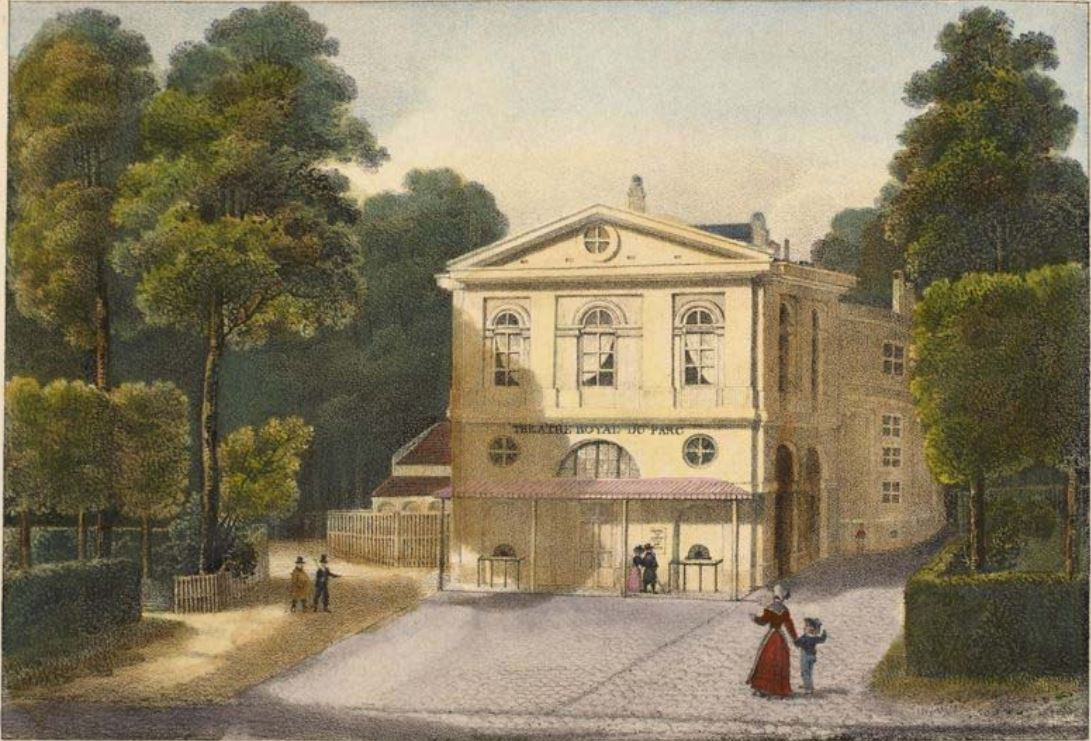 Théâtre Royal du Parc. X Kreins Jobard